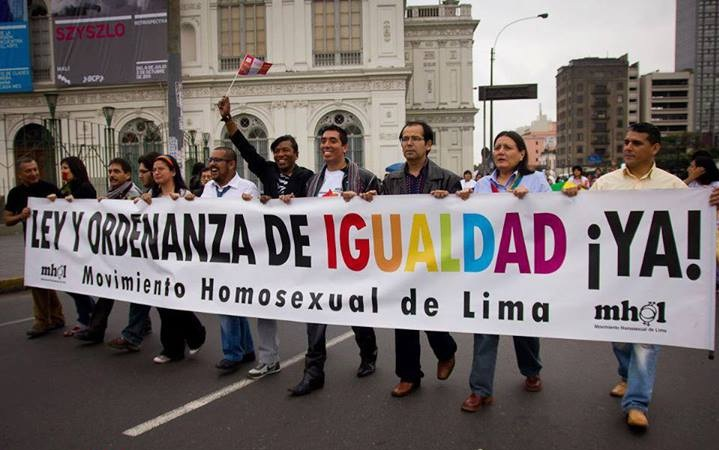 Lima. Marcha del Orgullo Gay en el 2011, personas LGBT y defensores de Derechos Humanos por una Ley y Ordenanza de Igualdad.